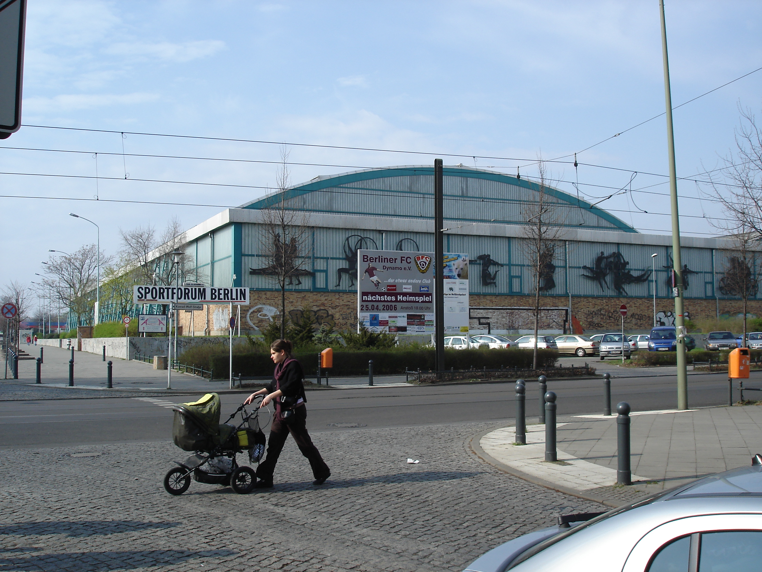 Sportforum Hohenschönhausen - Blick von der Konrad-Wolf-Straße